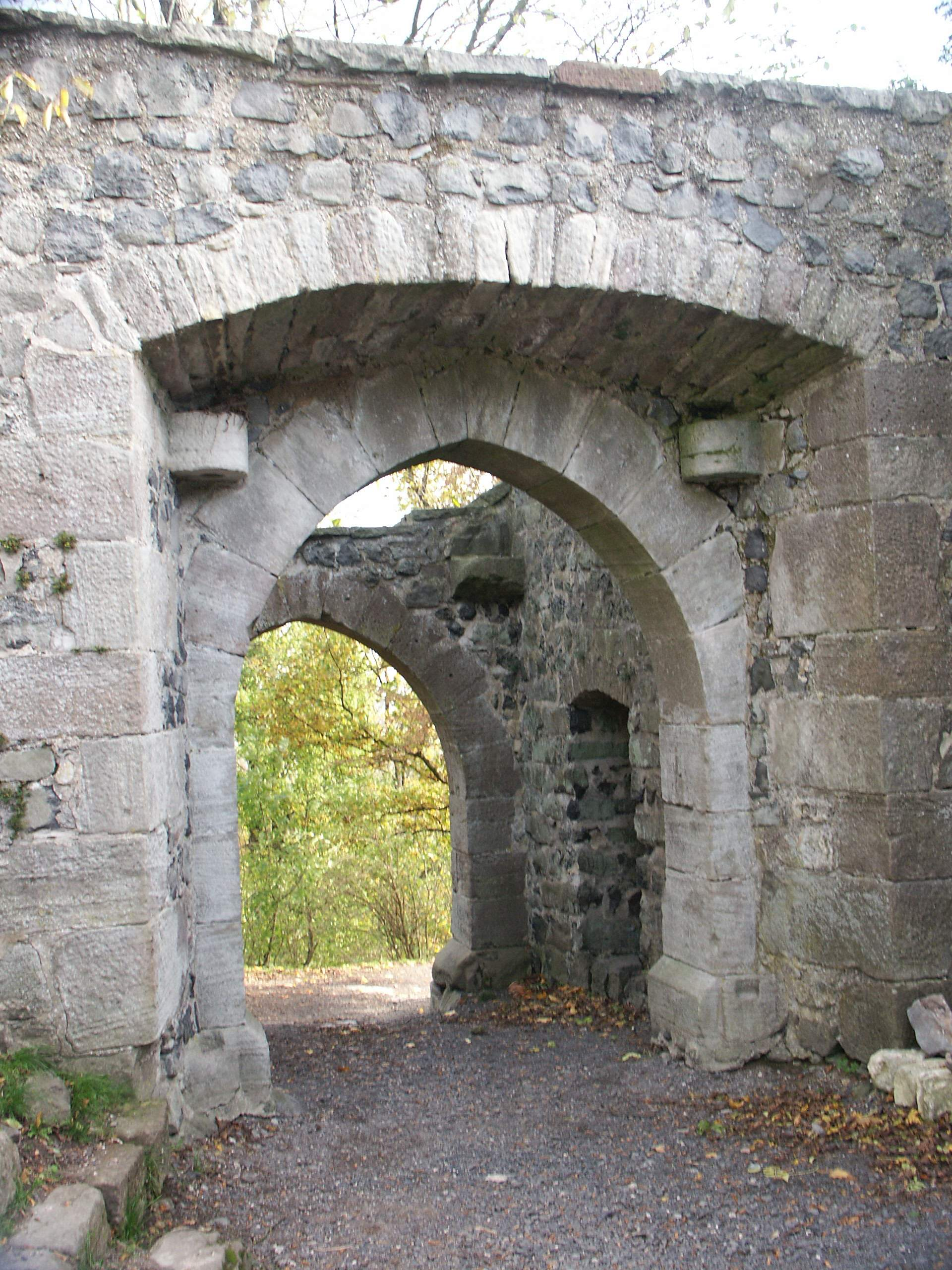 Torhaus der Burg Hauneck von innen